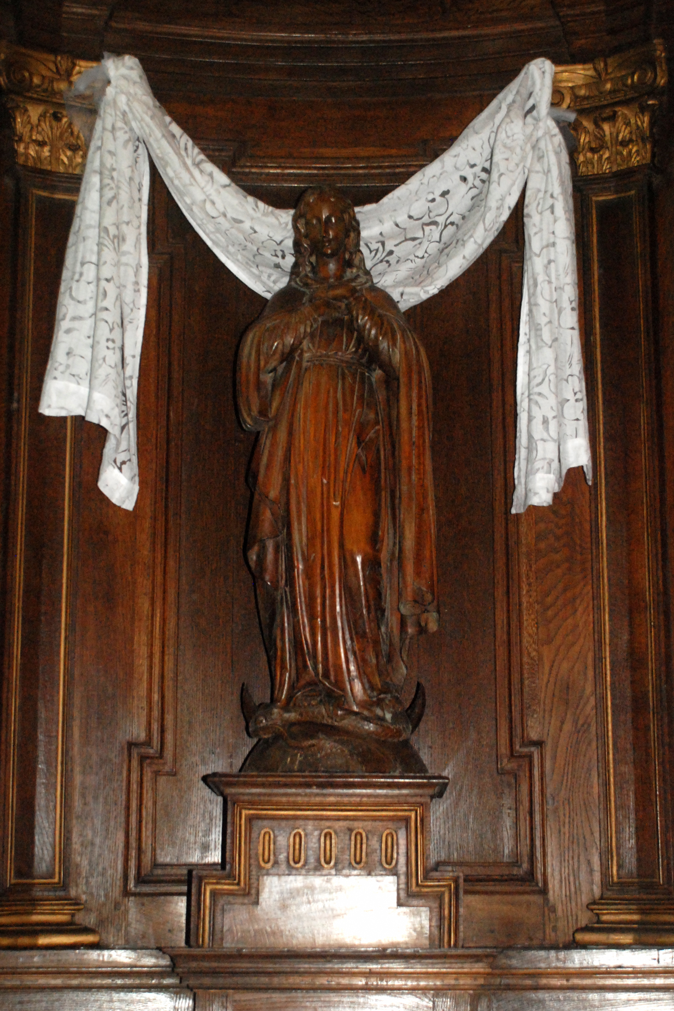 Belgique - Brabant wallon - Ottignies - église Saint-Rémi